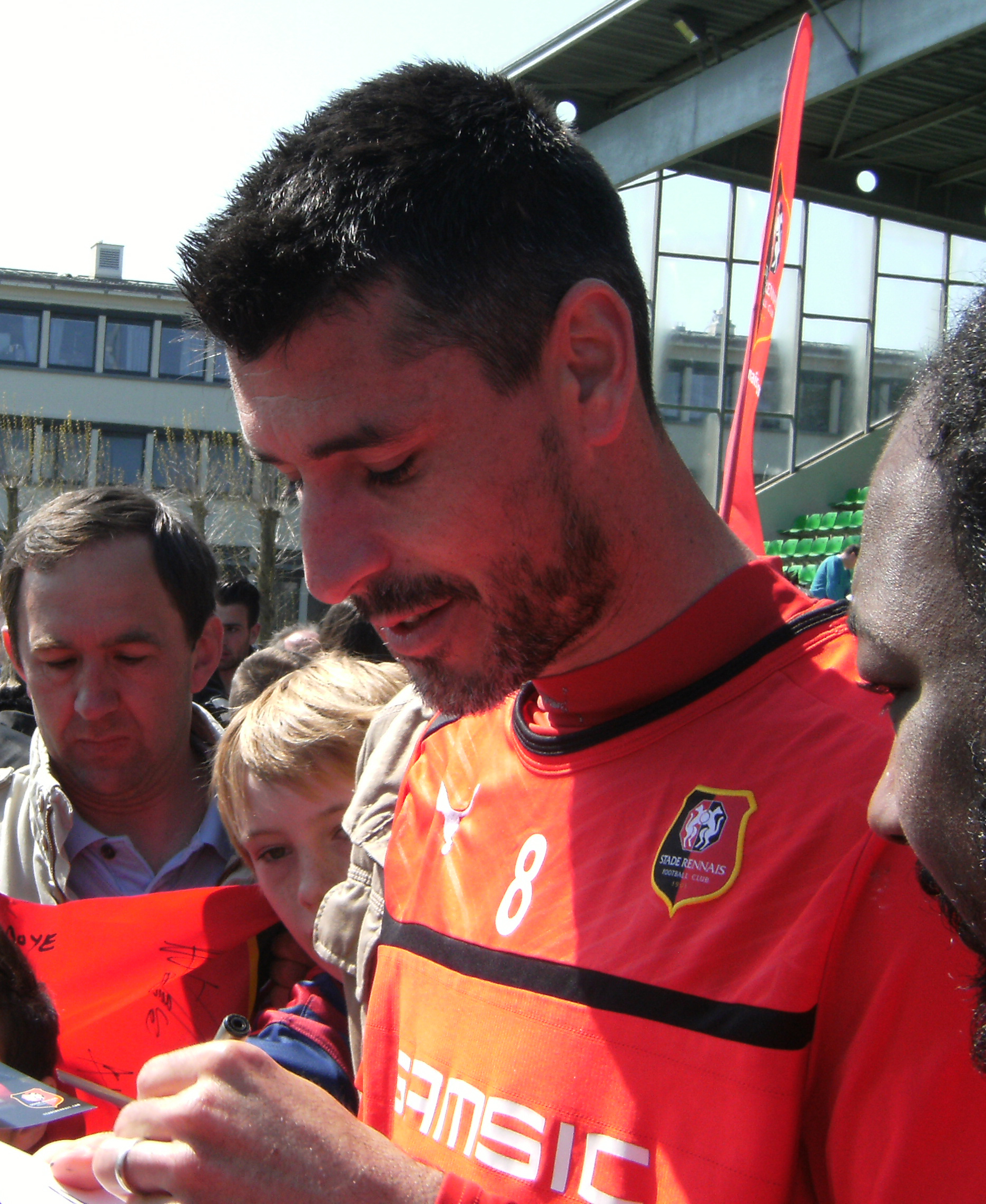 Photo prise lors d'un entraînement du Stade rennais au stade de Marville de Saint-Malo le 3 mai 2013. Julien Féret répond aux sollicitations des supporters.